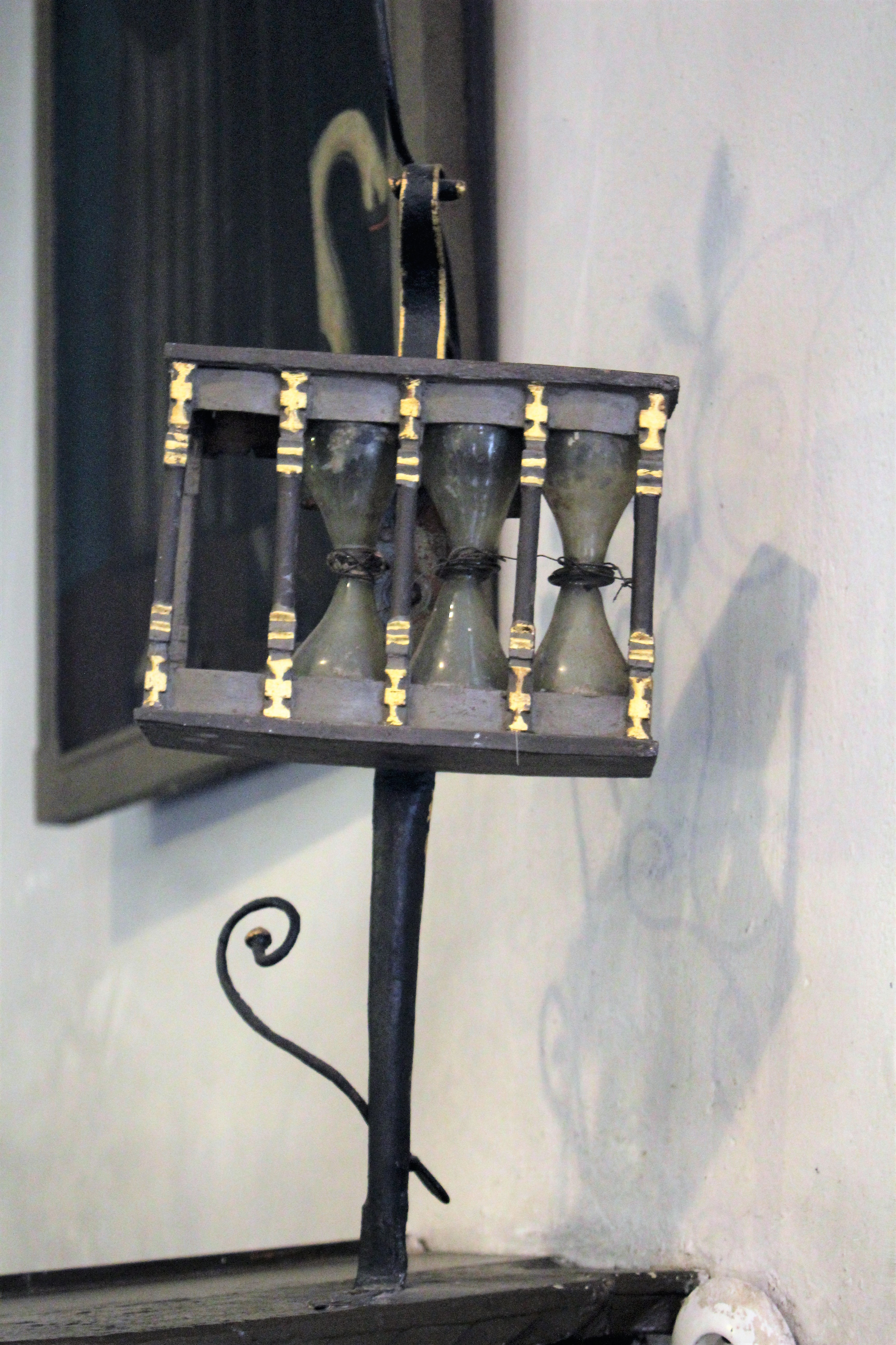 Evanglische Kirche Rodenhausen, Gemeinde Lohra, Landkreis Marburg-Biedenkopf, Hessen, Deutschland